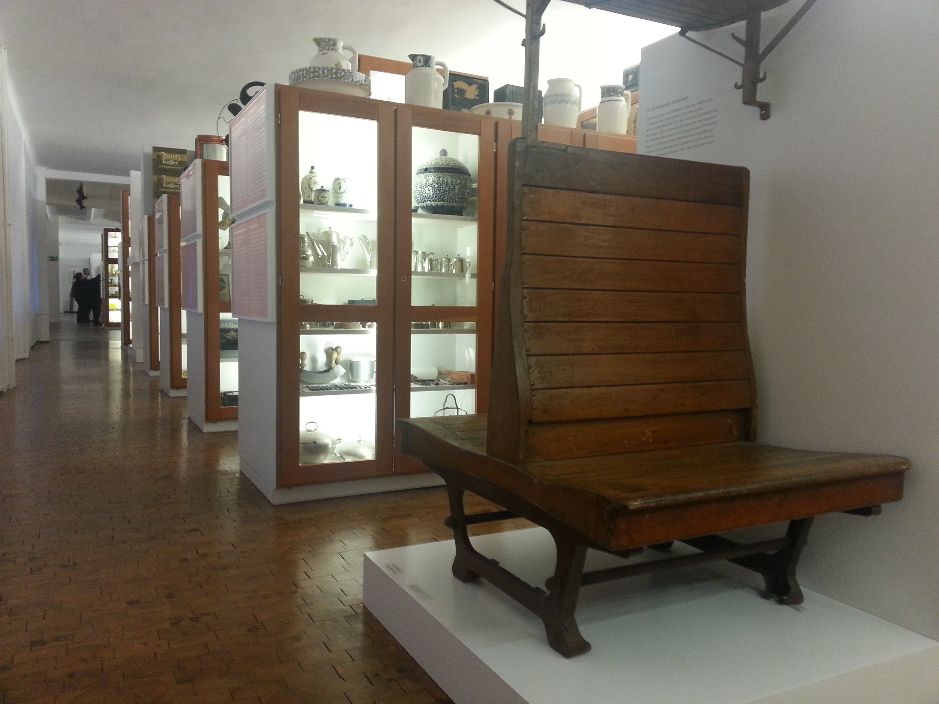 Germany, Berlin-Kreuzberg, Museum